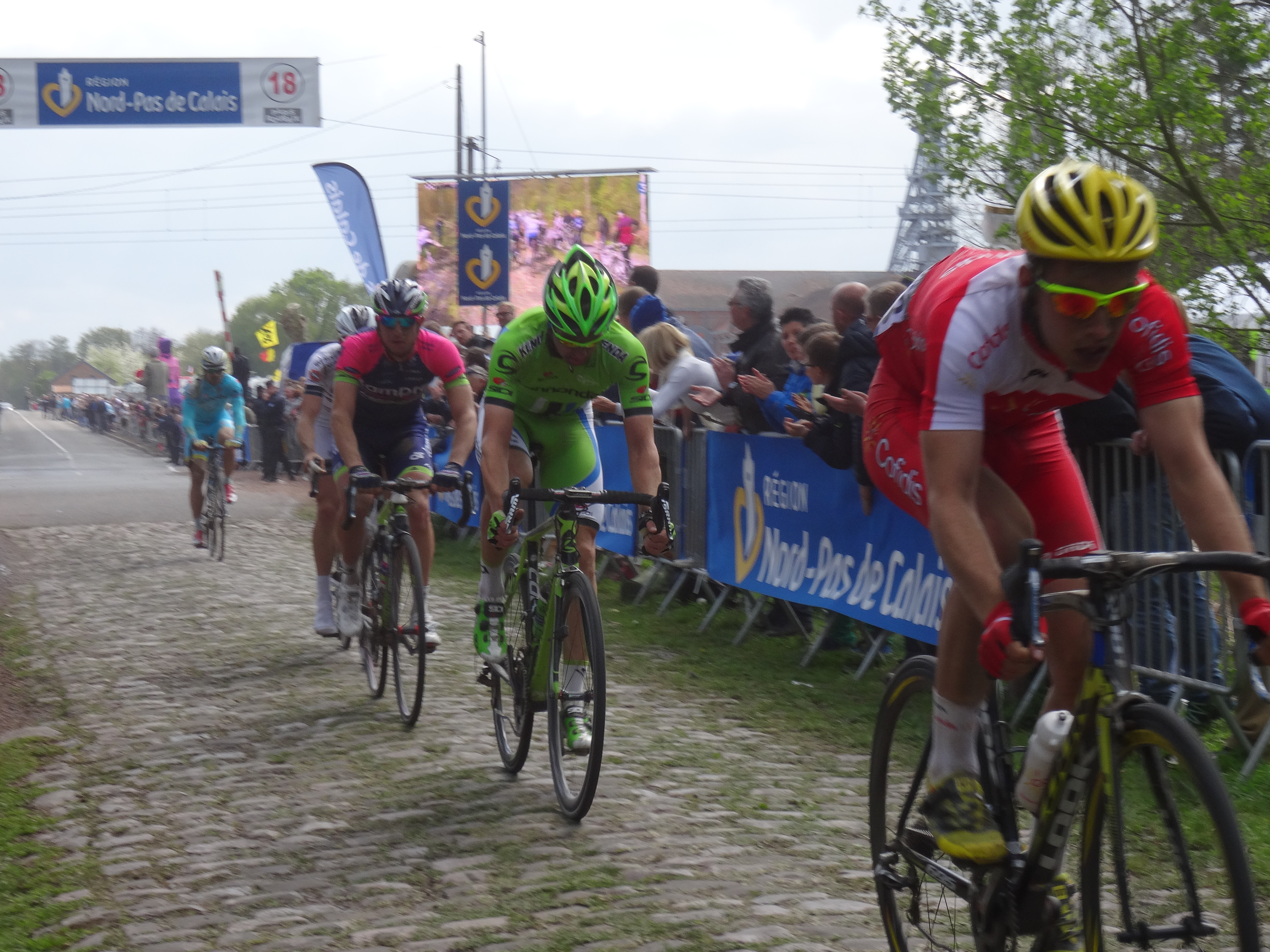 Passage du Paris-Roubaix 2014 sur la Trouée d'Arenberg le 13 avril 2014 à Wallers, Nord, Nord-Pas-de-Calais, France.